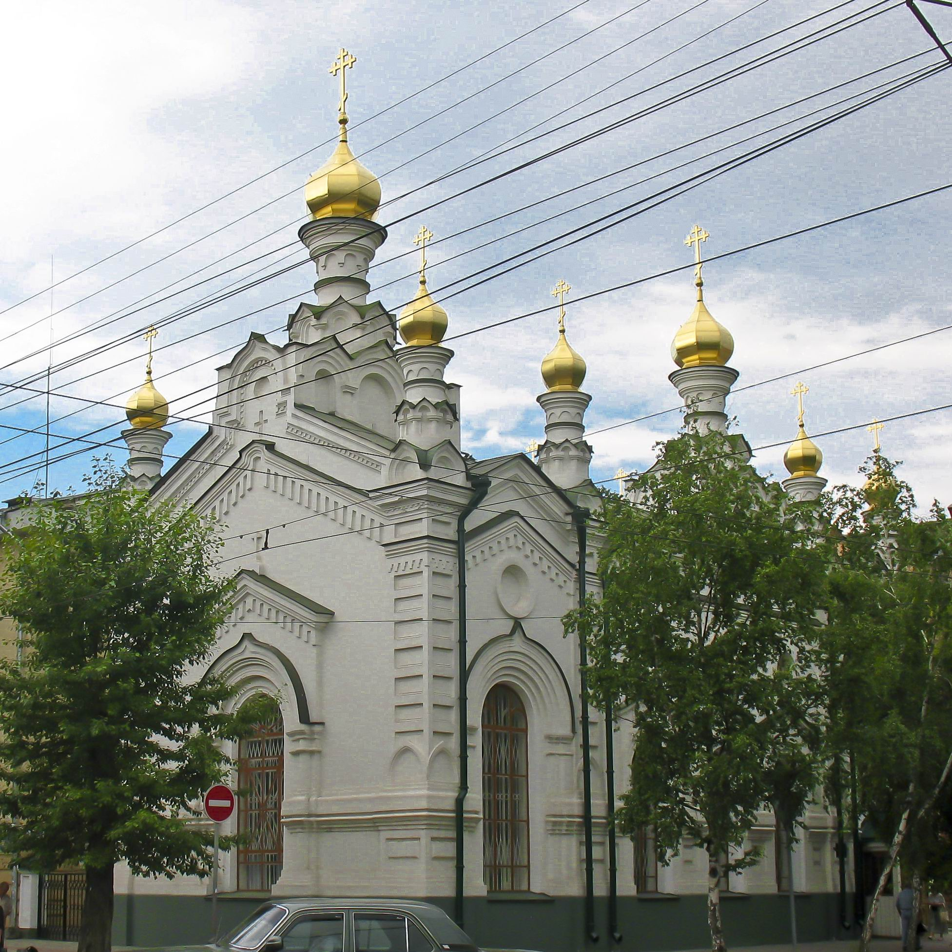 Церковь Александра Невского в Томске